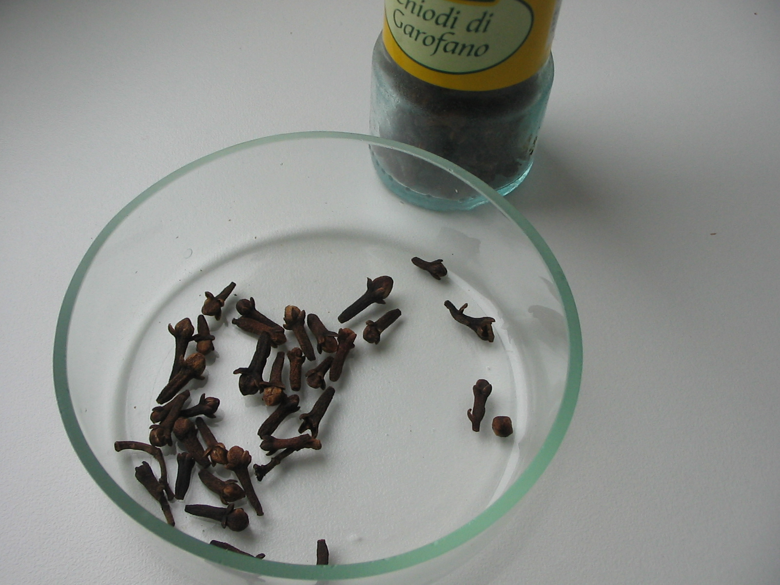 сухі бруньки гвоздичного дерева